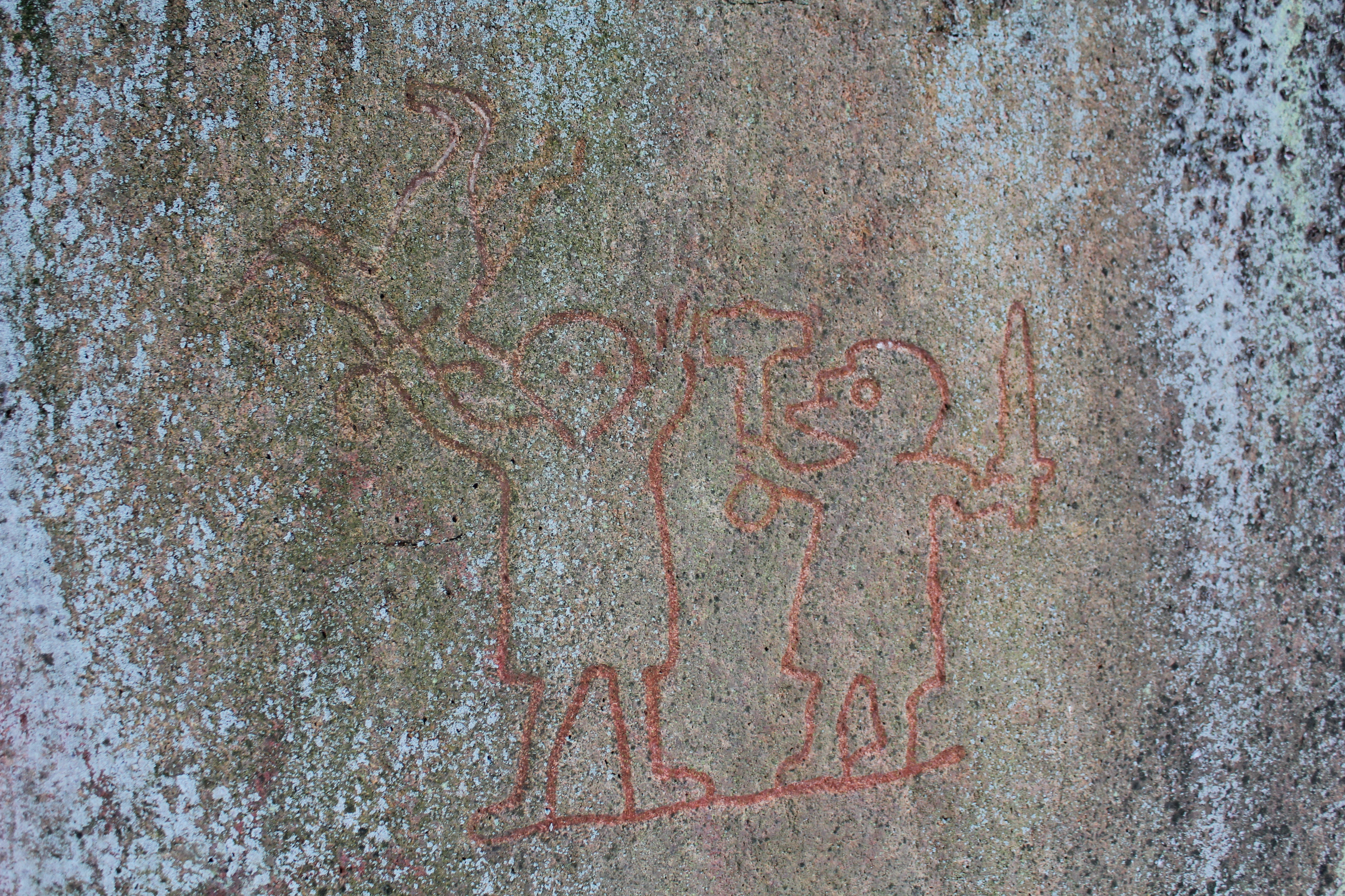 Den så kallade "Riksbyristningen" i Riksby, Bromma.